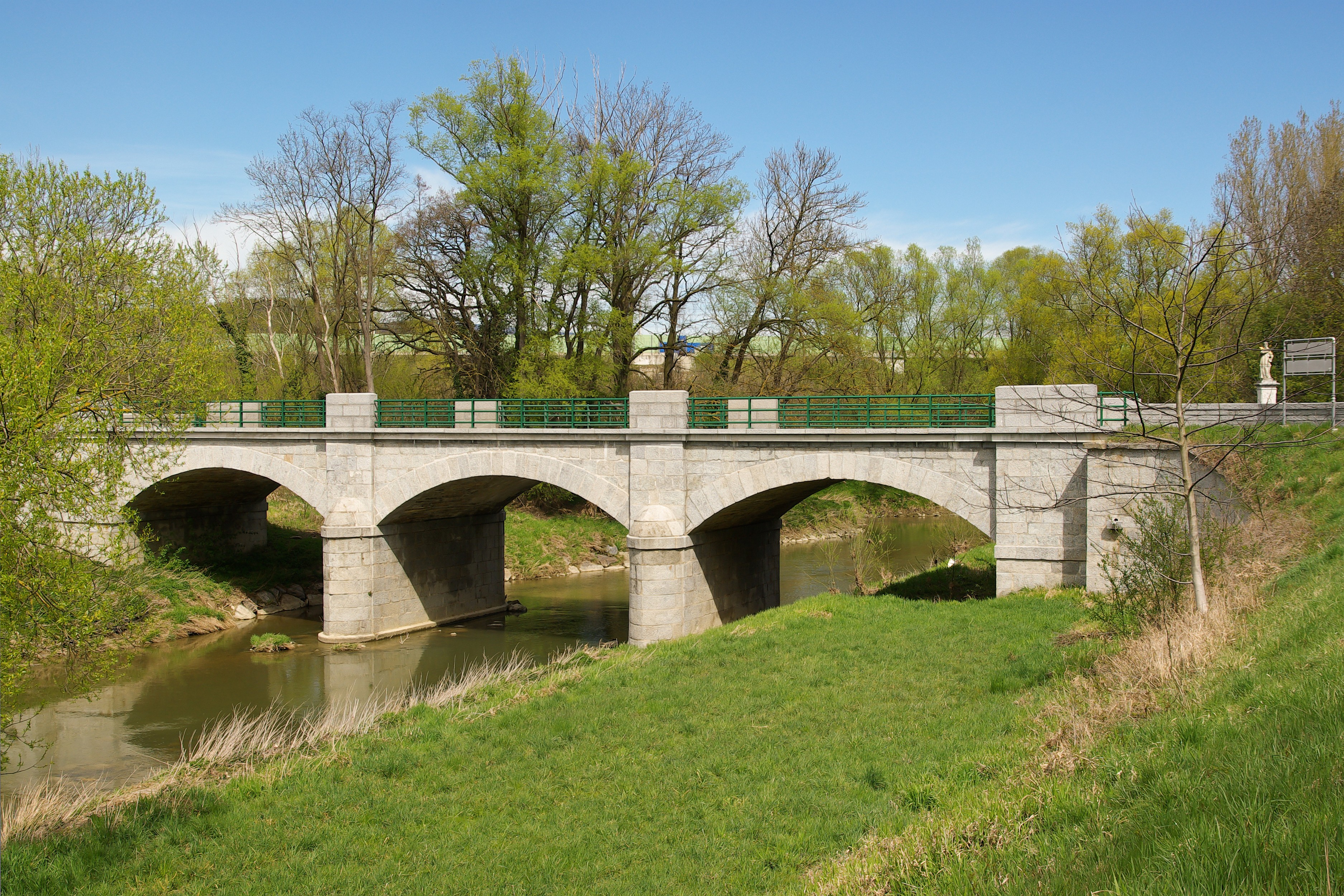 Straßenbrücke über den Melkfluss in Winden.